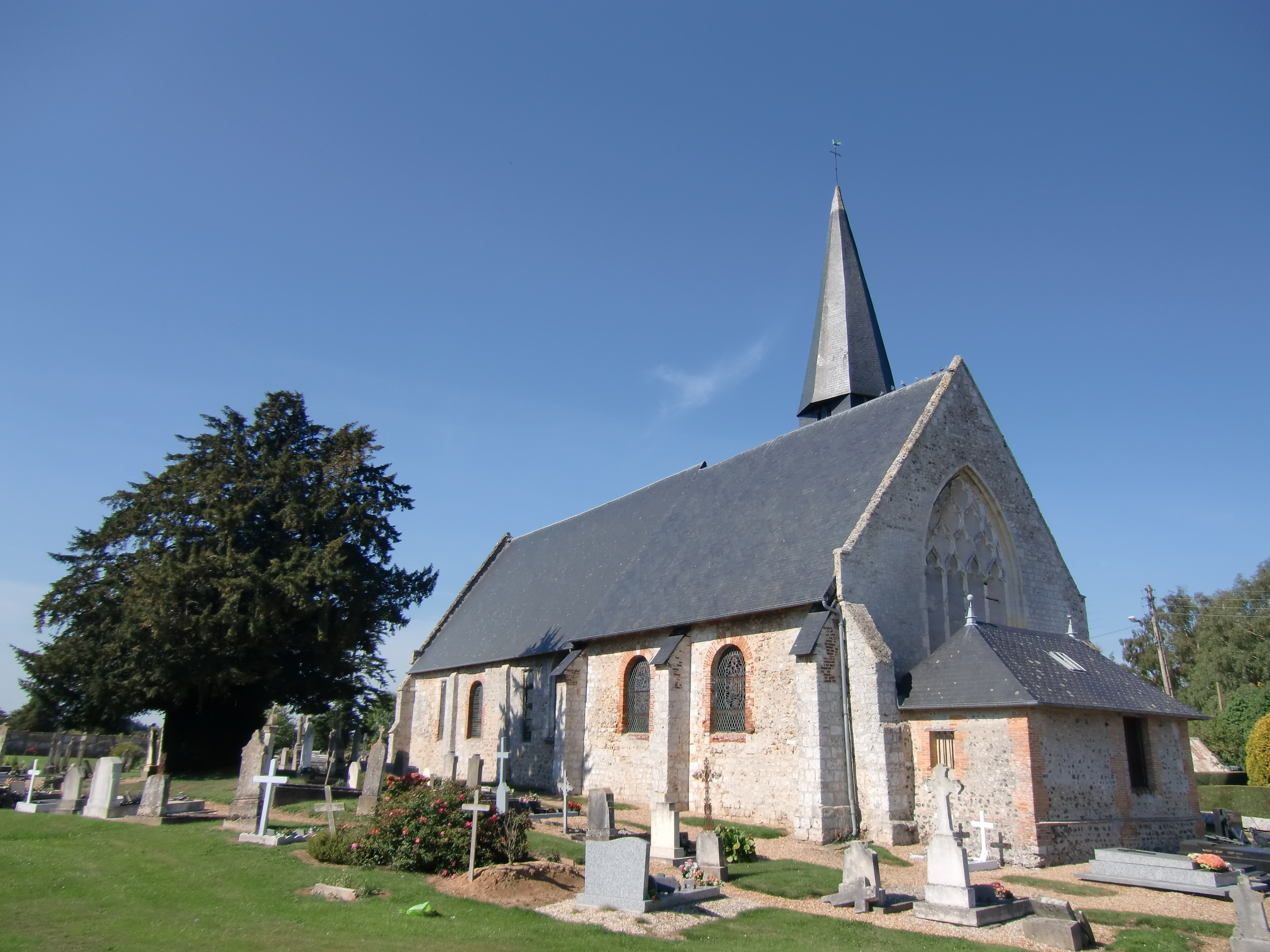 église du Torpt (Eure, Normandie, France)